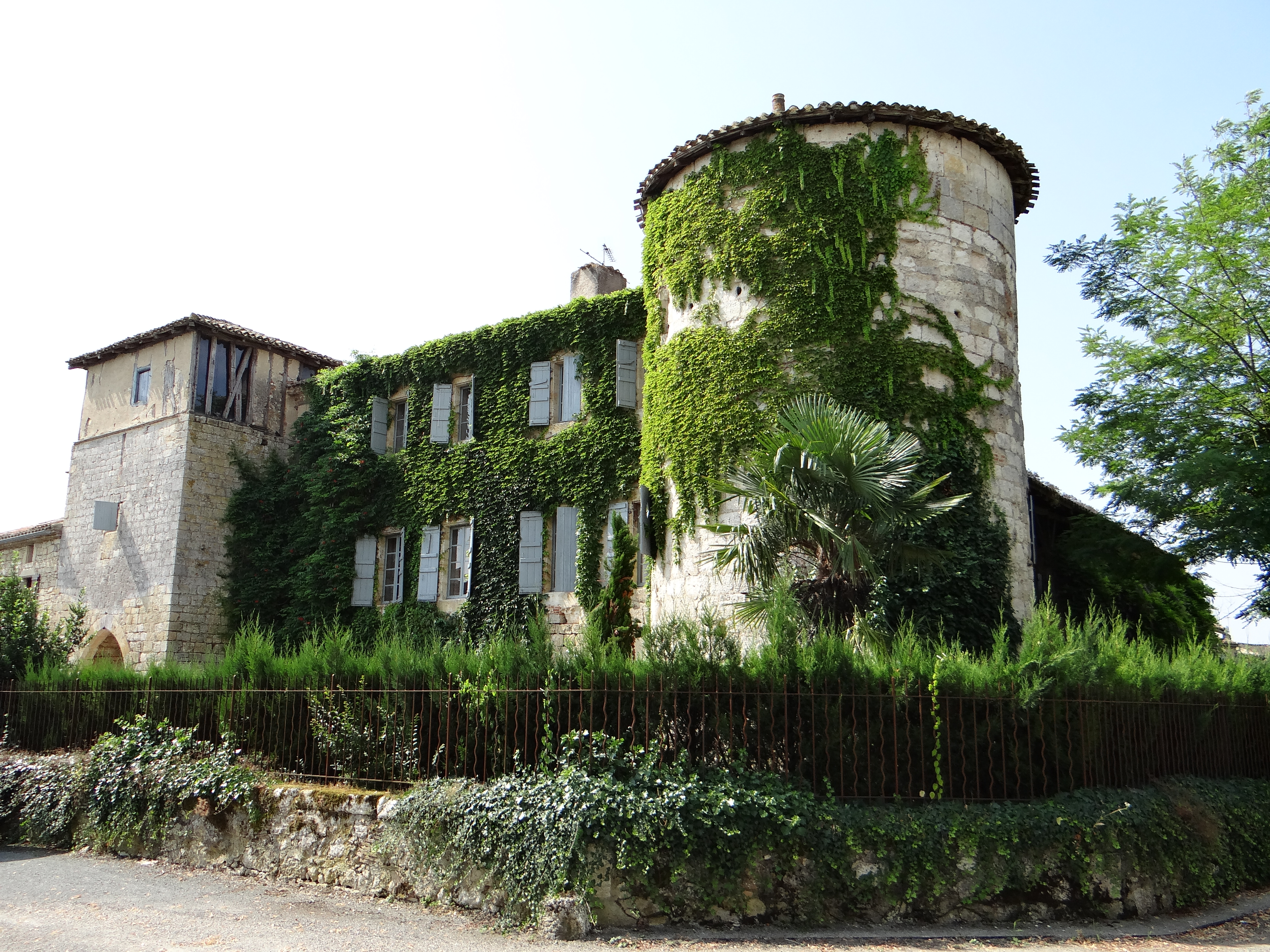 Saint-Antoine (Gers) - Commanderie de Saint-Antoine et porte de la Commanderie